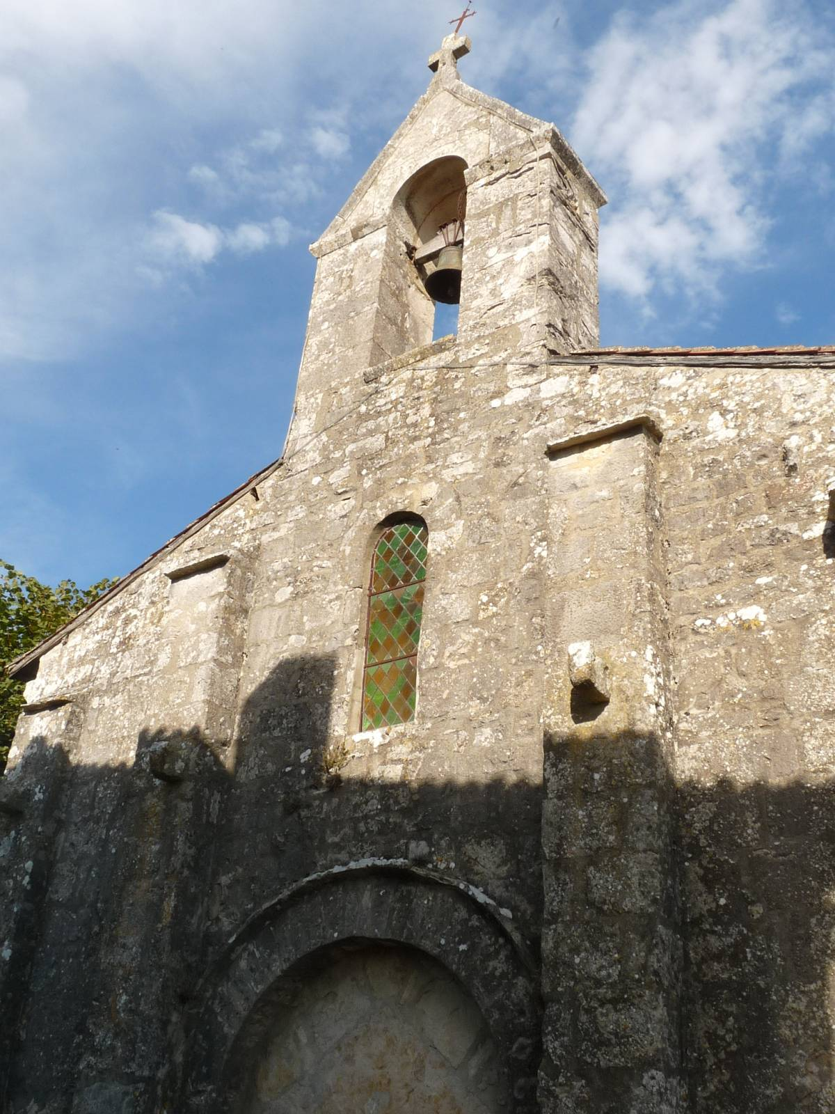 l'église de Pougné, Charente, France